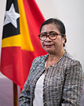 Rosalina Ximenes, Abgeordnete des Nationalparlaments Osttimors